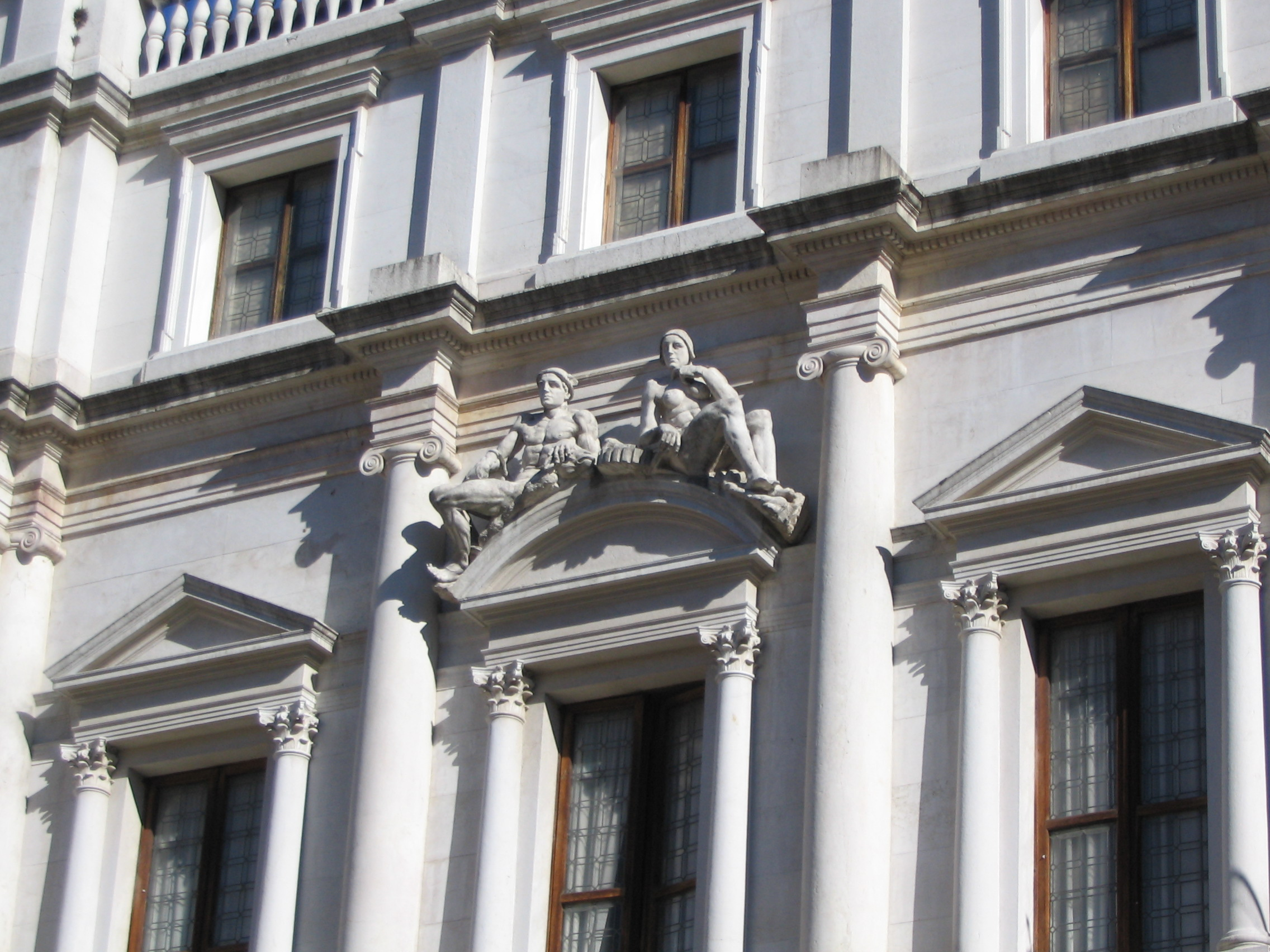 Bergamo, Palazzo Nuovo, statue sulla trabeazione del secondo finestrone da ovest.